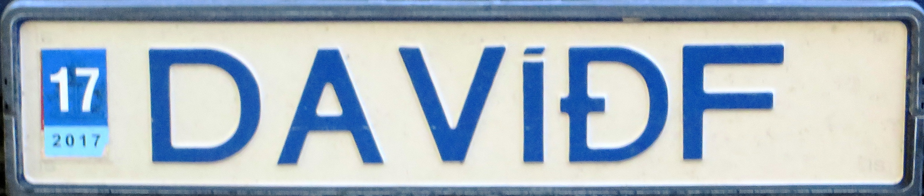 IJSLAND kentekenplaat